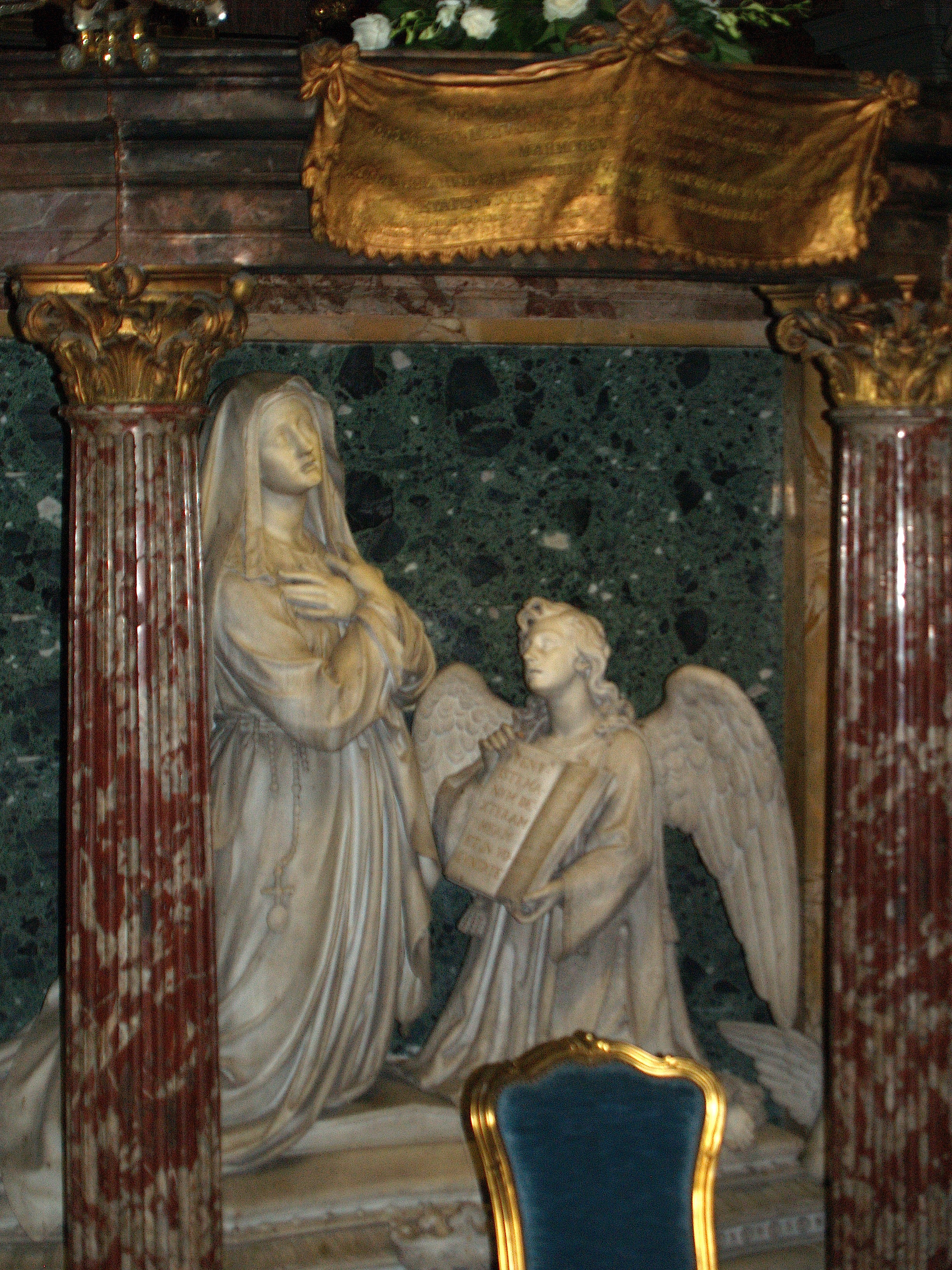 Roma. Santa Francesca Romana. Interior.